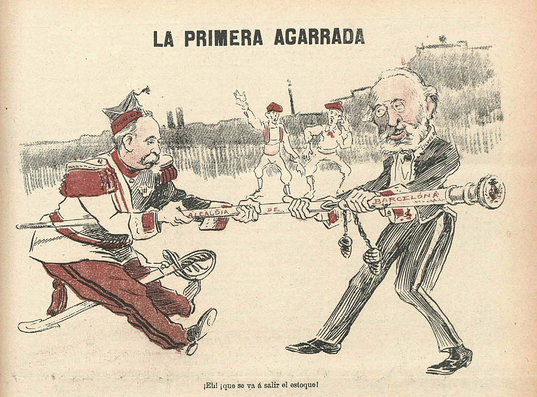 La primera agarrada, en la revista satírica española Gedeón.